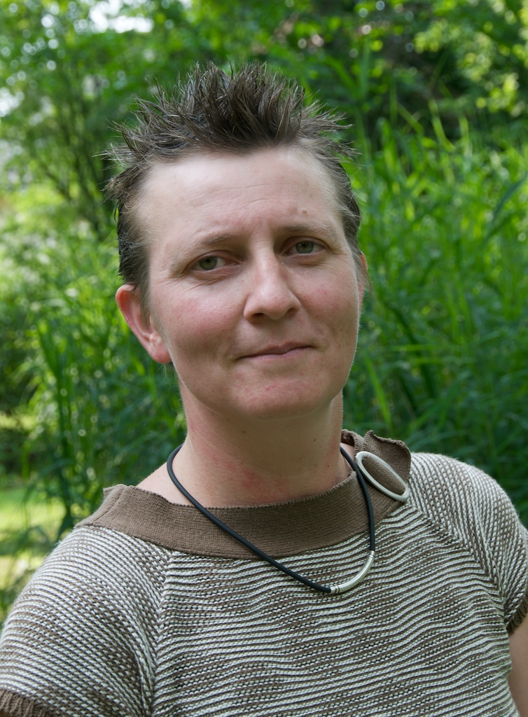 D'Aline Schmitz.